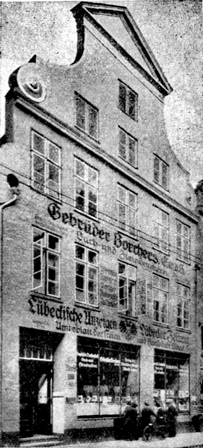 Geschäftshaus des Verlages der Lübeckischen Anzeigen seit 1886 anno 1926